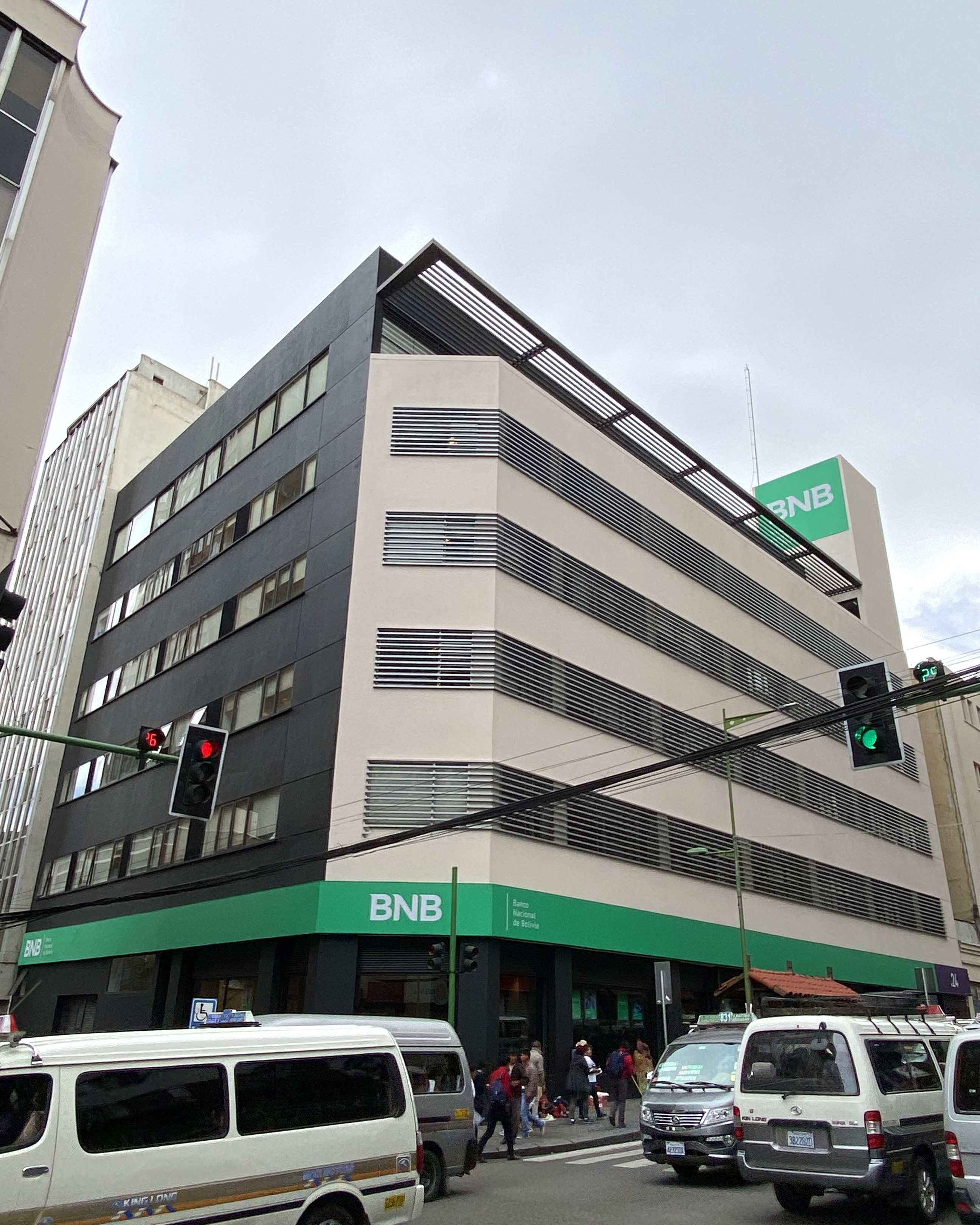 Oficinas centrales del Banco Nacional de Bolivia en La Paz.